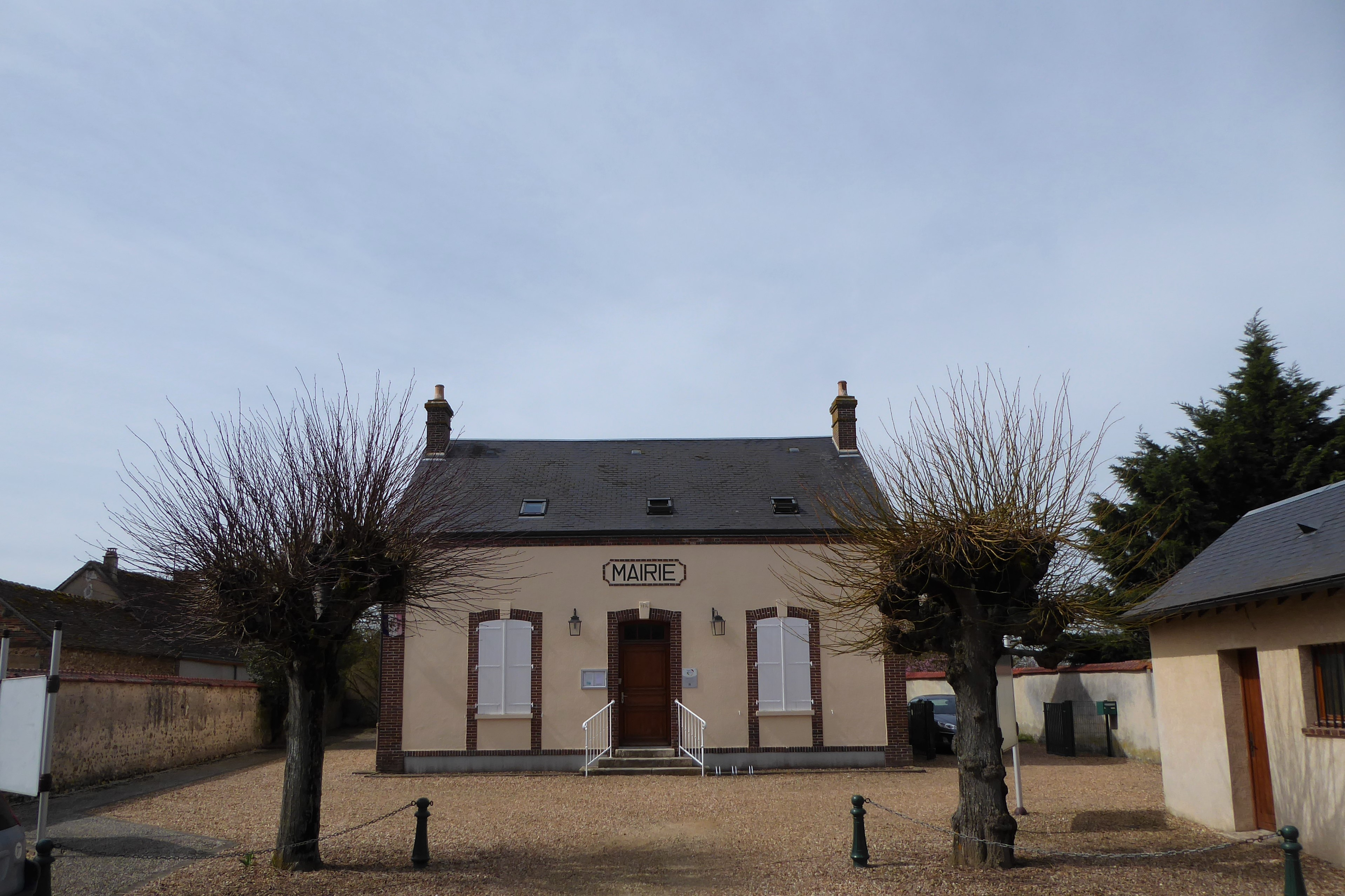 mairie de Boissy-en-Drouais, Eure-et-Loir, France.